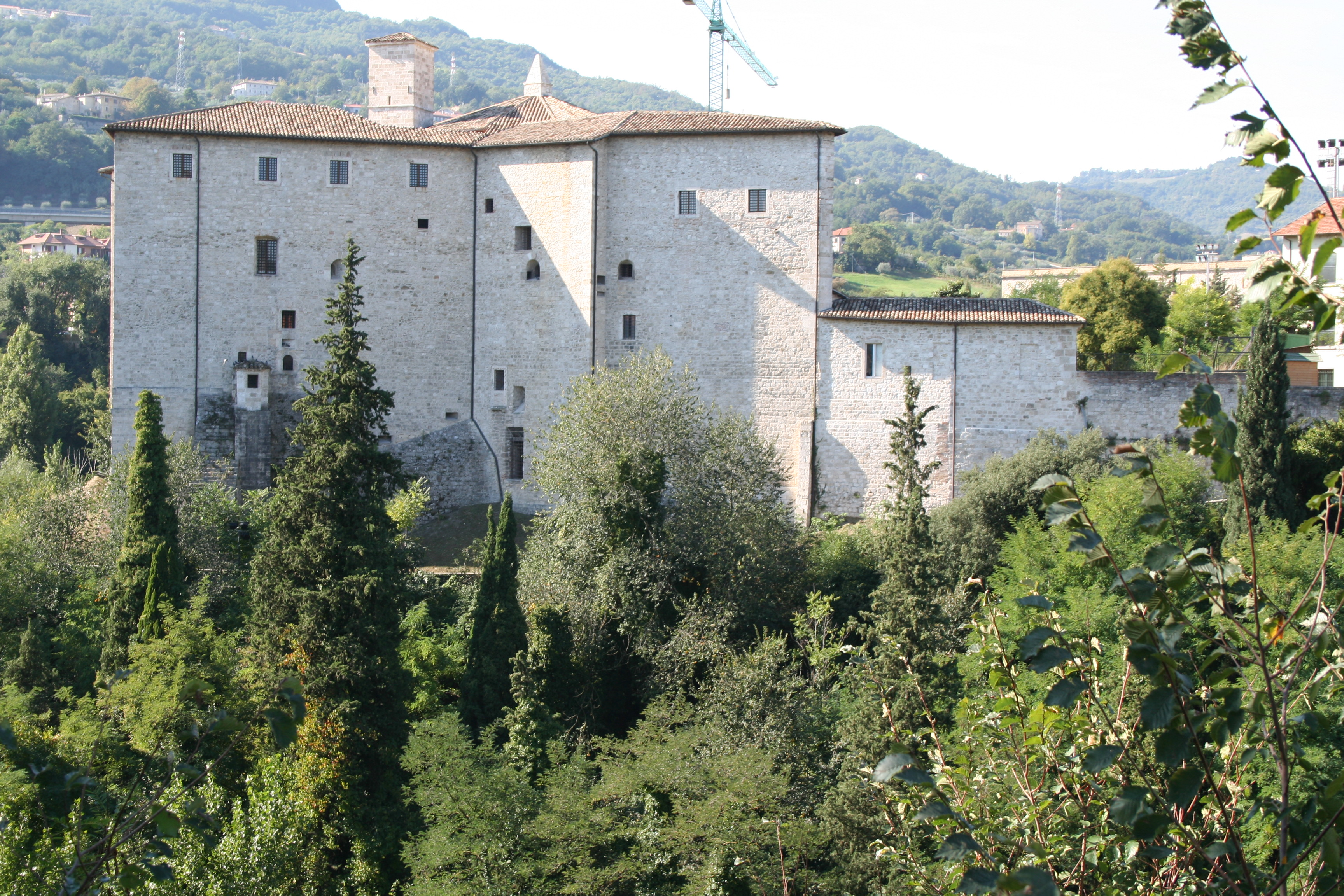 Forte Malatesta Ascoli Piceno, ottobre 2006 proprio scatto 2006-10-01 Sibilla.io "Utilizzo concesso" This file is licensed under Creative Commons 3.0 license